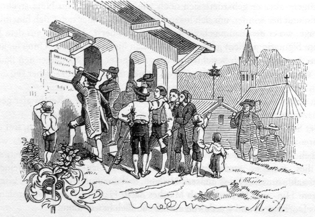 Berthold Auerbach, Schwarzwälder Dorfgeschichten, Befehlerles, Zeichnung von Mathias Artaria, 1848.